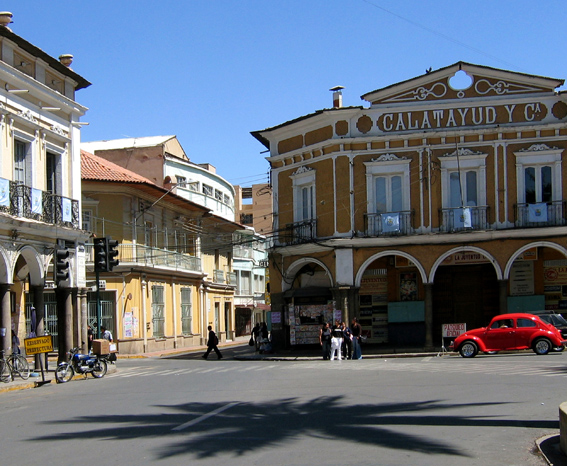 Casa calatayud ; Cochabamba Bolivia